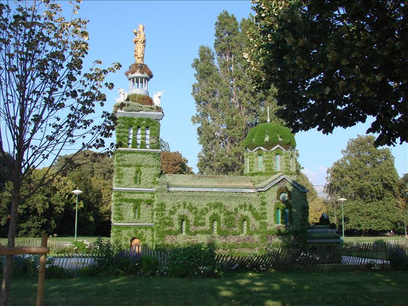 Mosaïculture Notre-Dame de la Garde (Parc Borély à Marseille)